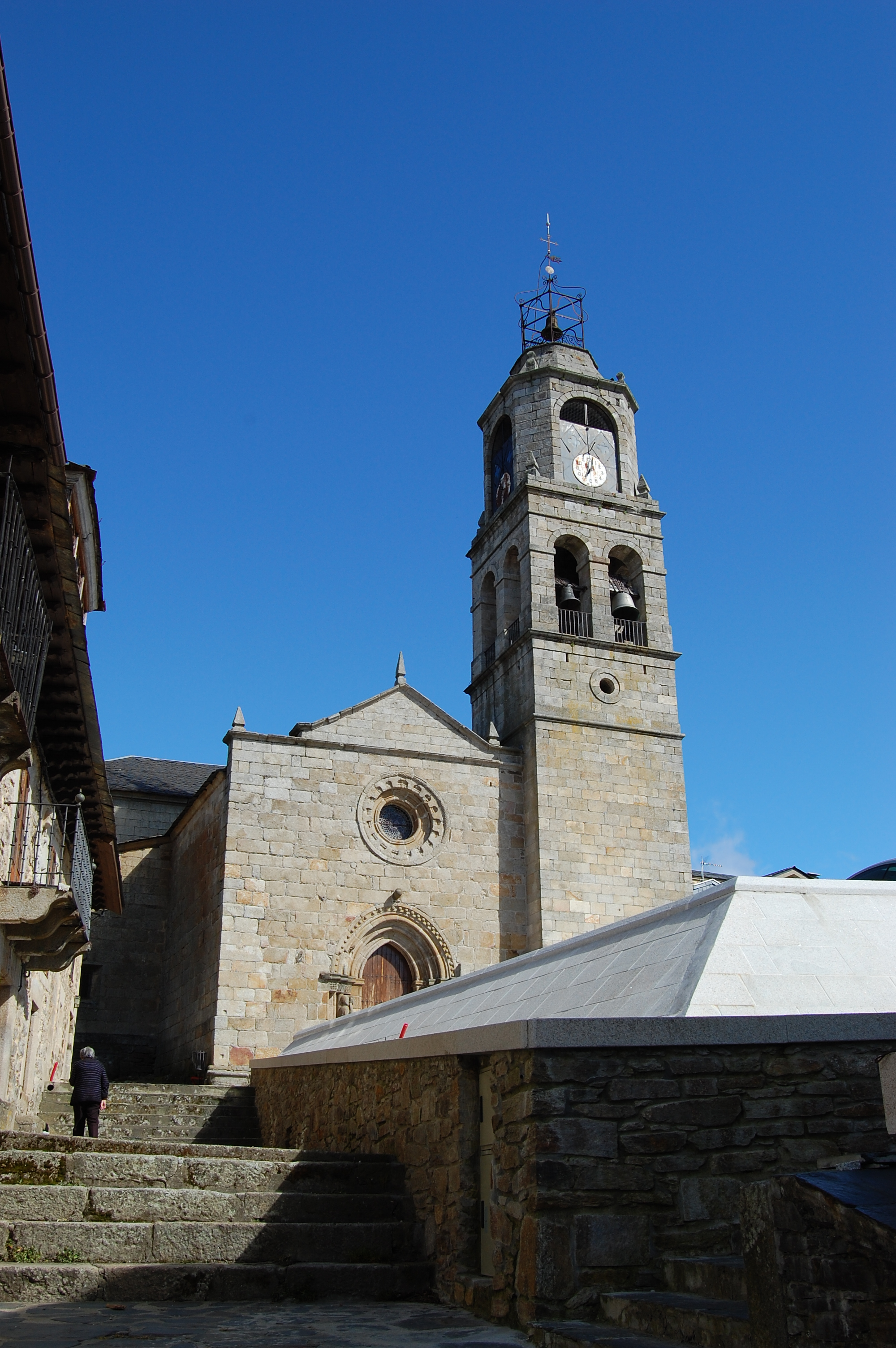 Puebla de Sanabria (Póvoa de Seabra), província de Zamora, Espanha.